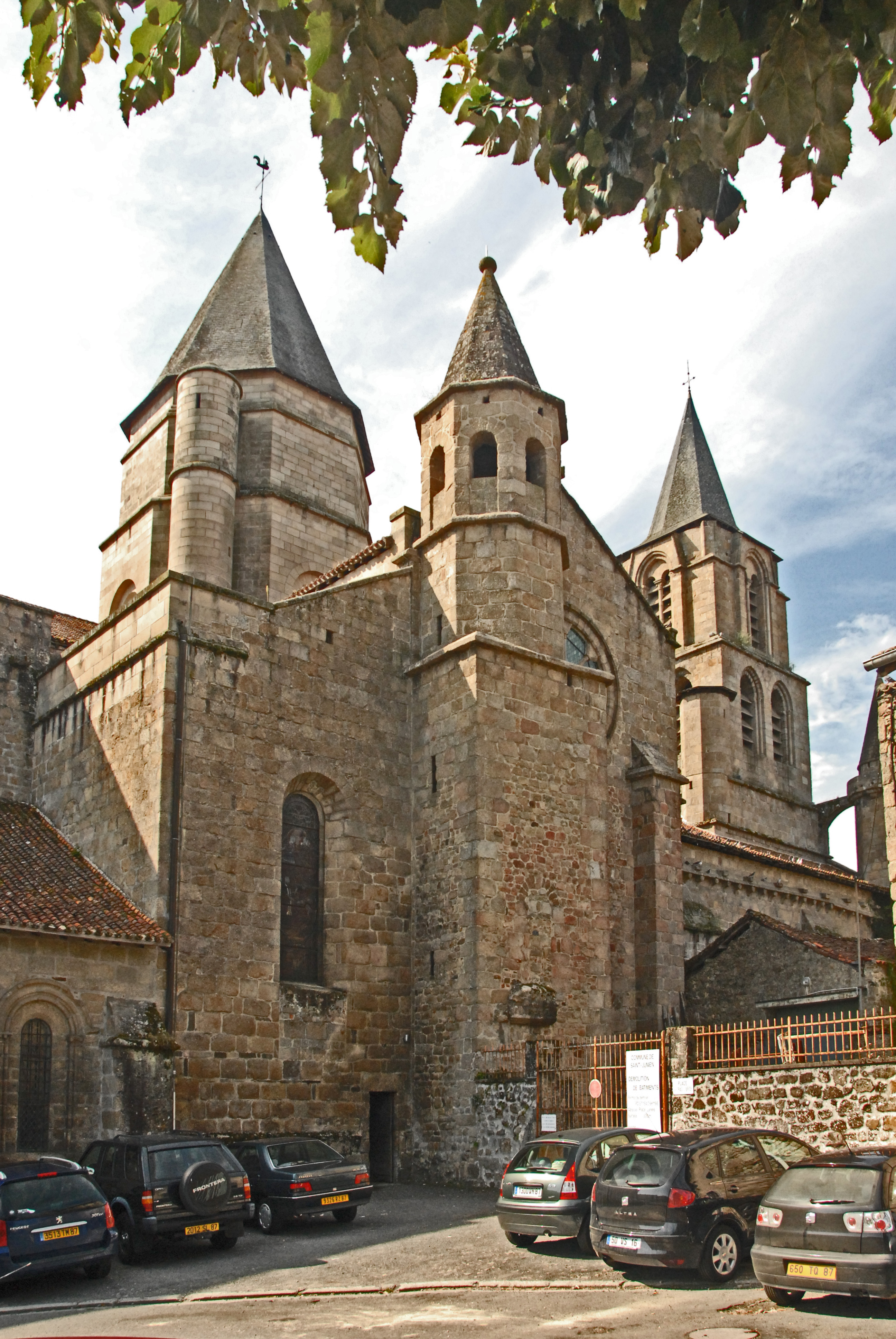 St-Junien, Querhaus, Kapelle u. drei Türme